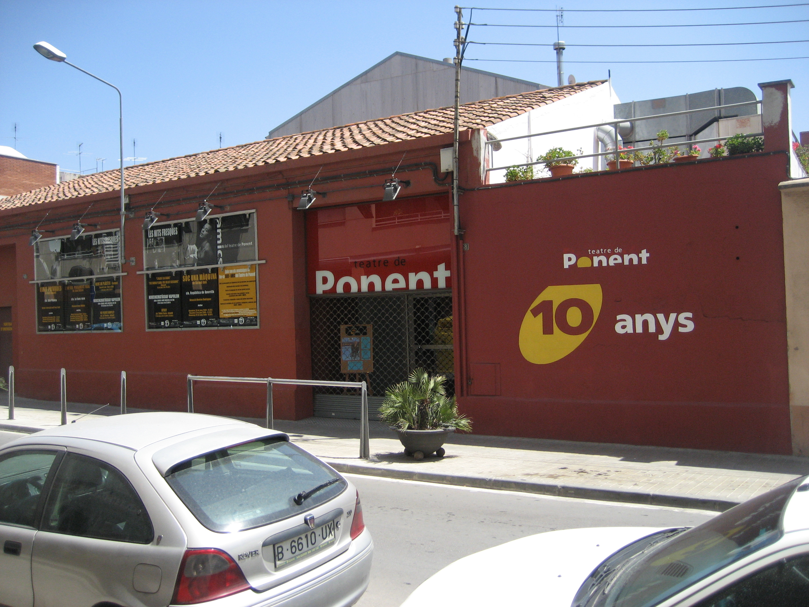 Façana del Teatre de Ponent, Granollers, juliol 2009